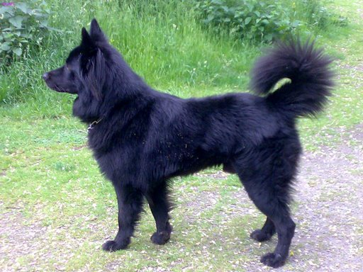 Altdeutscher Hütehund, Rüde , ost/mitteldeutscher Schlag